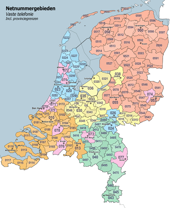 Netnummergebieden in Nederland voor vaste telefonie. Getekend in Photoshop op basis van de publicatie van OPTA op